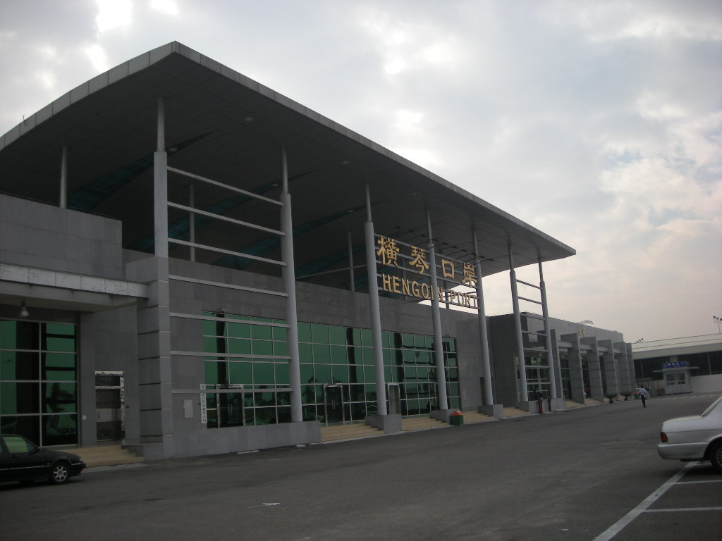 hengqin_port,juhai